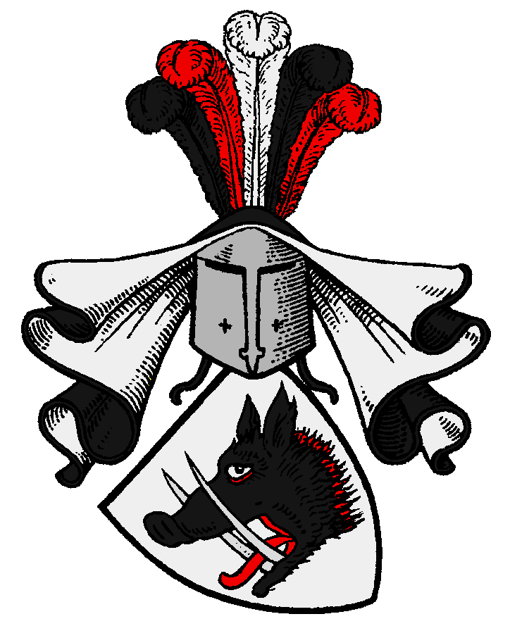 Wappen der von Grambow, eines alten mecklenburgisch-brandenburgischen Adelsgeschlechts.